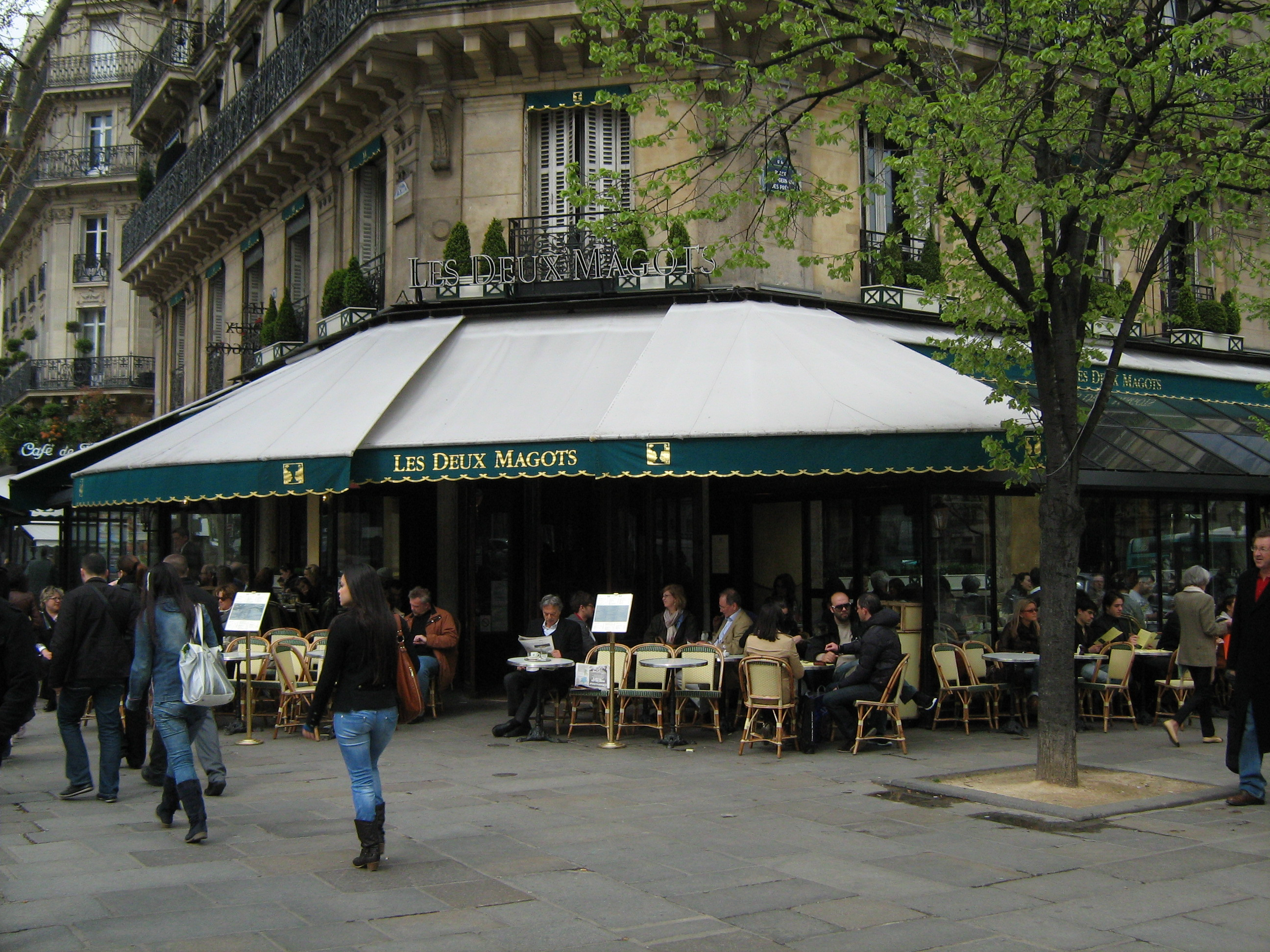 'Les Deux Magots' på Blvd. Saint-Germain i Paris. 8. april 2010